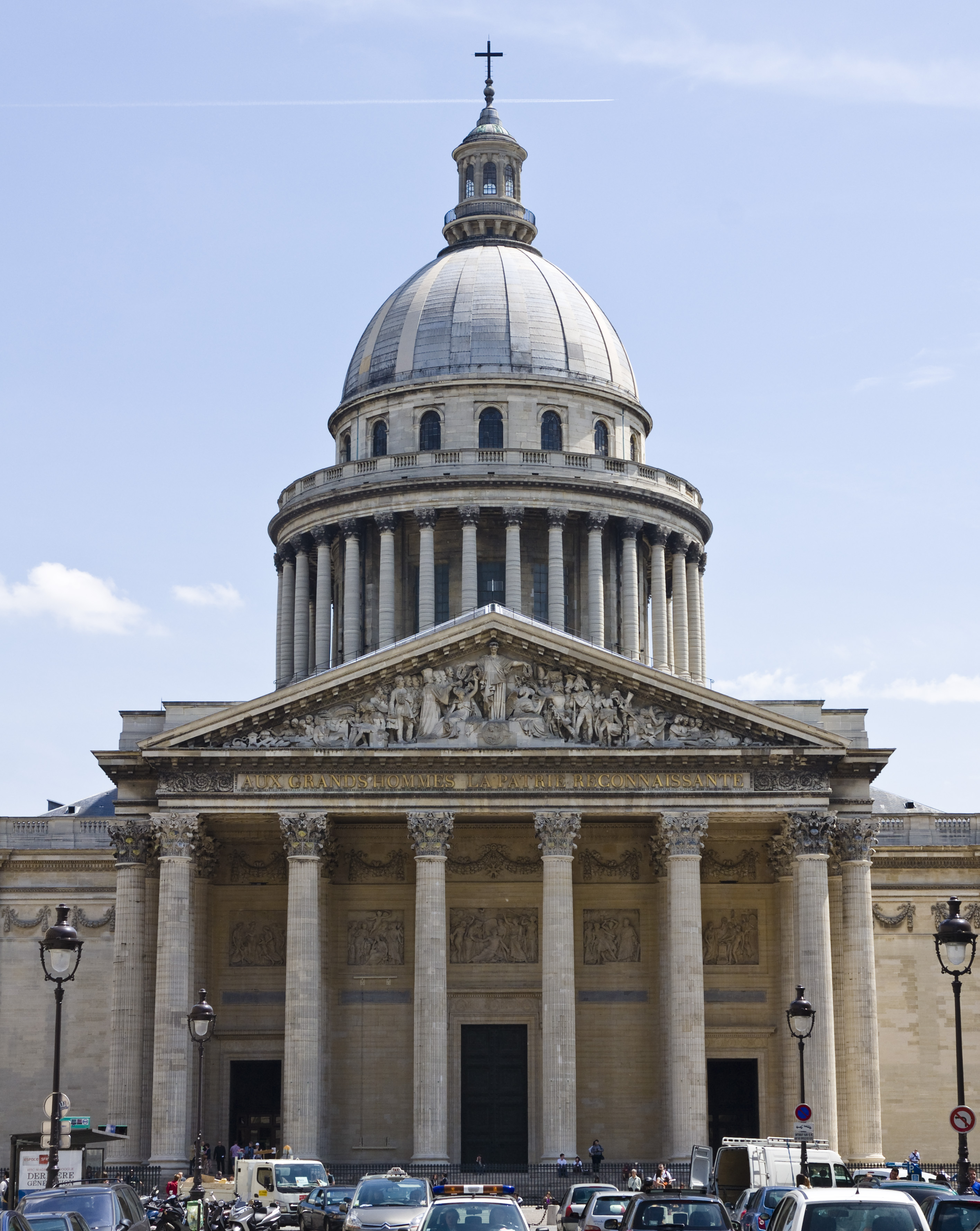 Façade du Panthéon - Paris